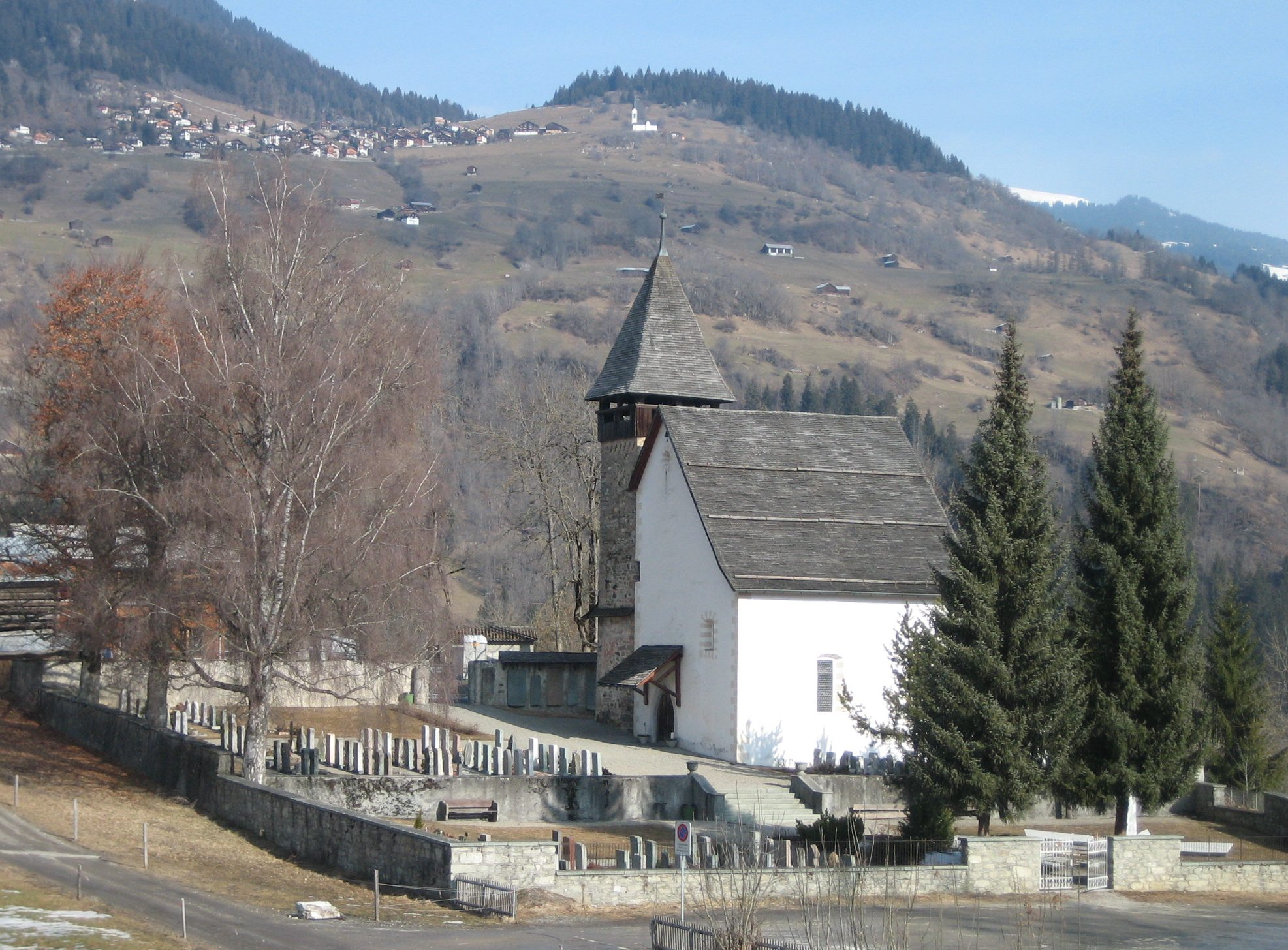 St. Martinskirche oberhalb Ilanz. Im Hintergrund die Kirche von Ladir.